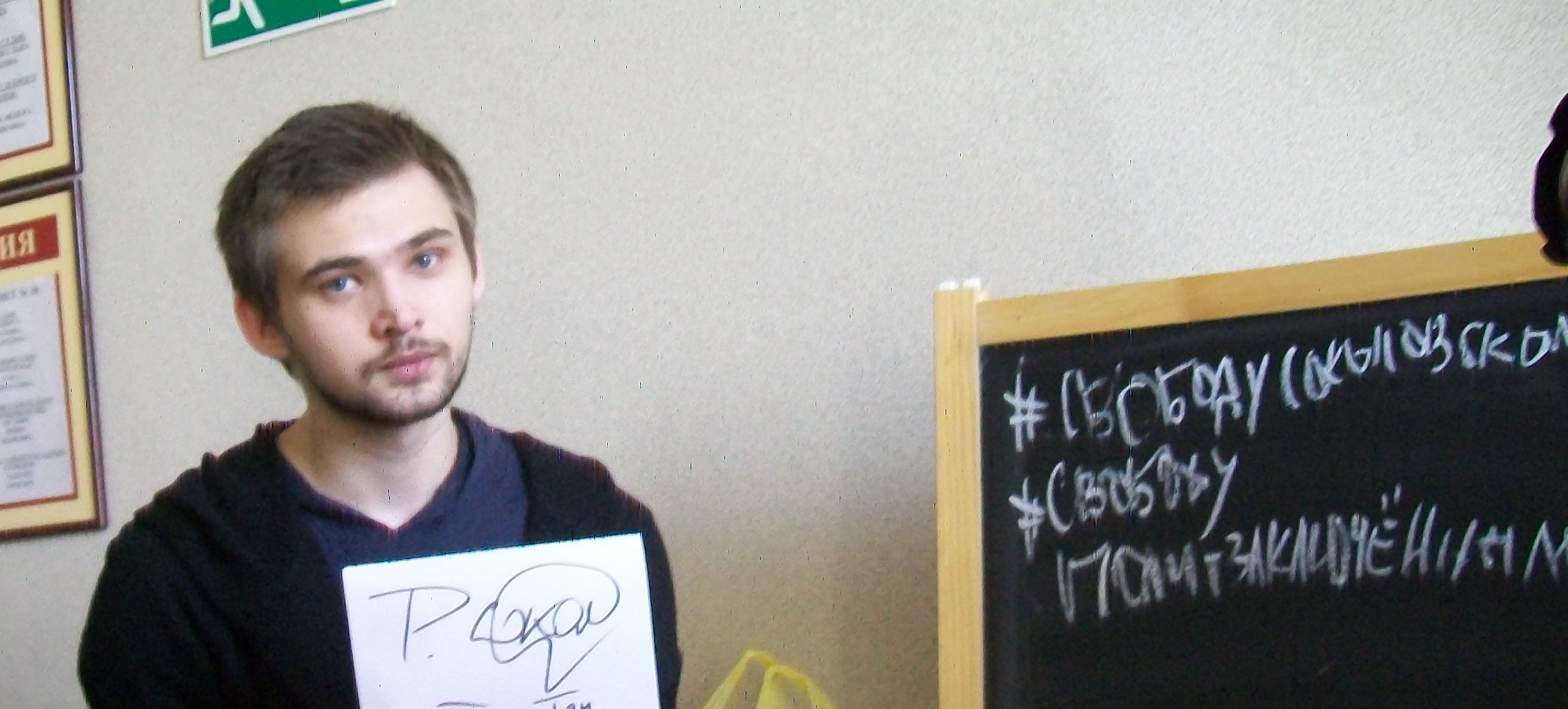 Блогер Руслан Геннадьевич Соколовский в Верх-Исетском районном суде Екатеринбурга после заседания суда в ожидании приезда машины ФСИН для доставления к месту отбывания домашнего ареста. 16 марта 2017 года.